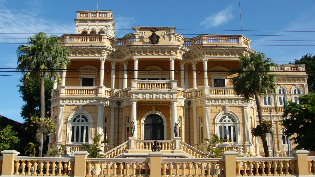 Centro Cultural Palácio Rio Negro, Manaus — Patrimônio histórico do Brasil.